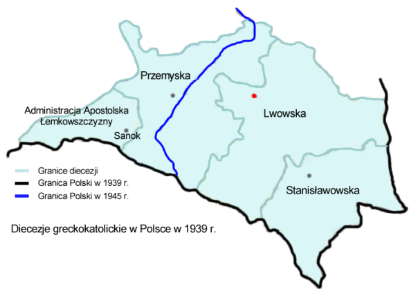 Metropolia lwowska (greckokatolicka) oraz Administracja Apostolska Łemkowszczyzny w II RP.